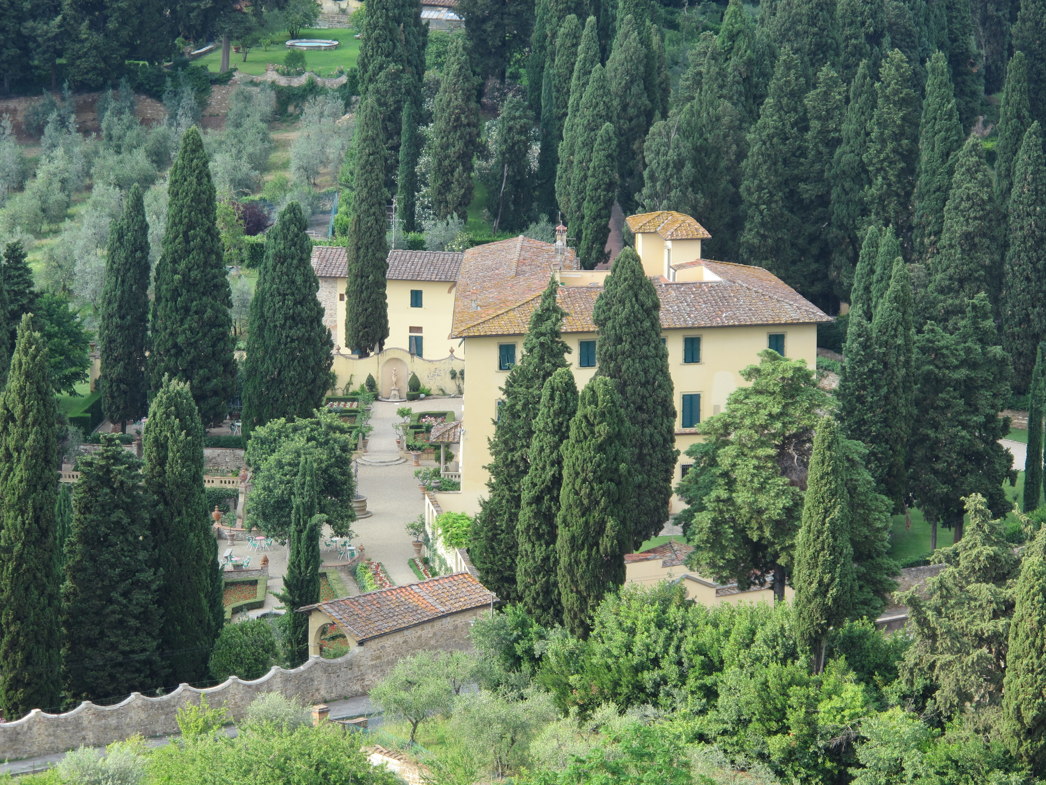 Torre del gallo, veduta, Villa Agape-Arrighetti